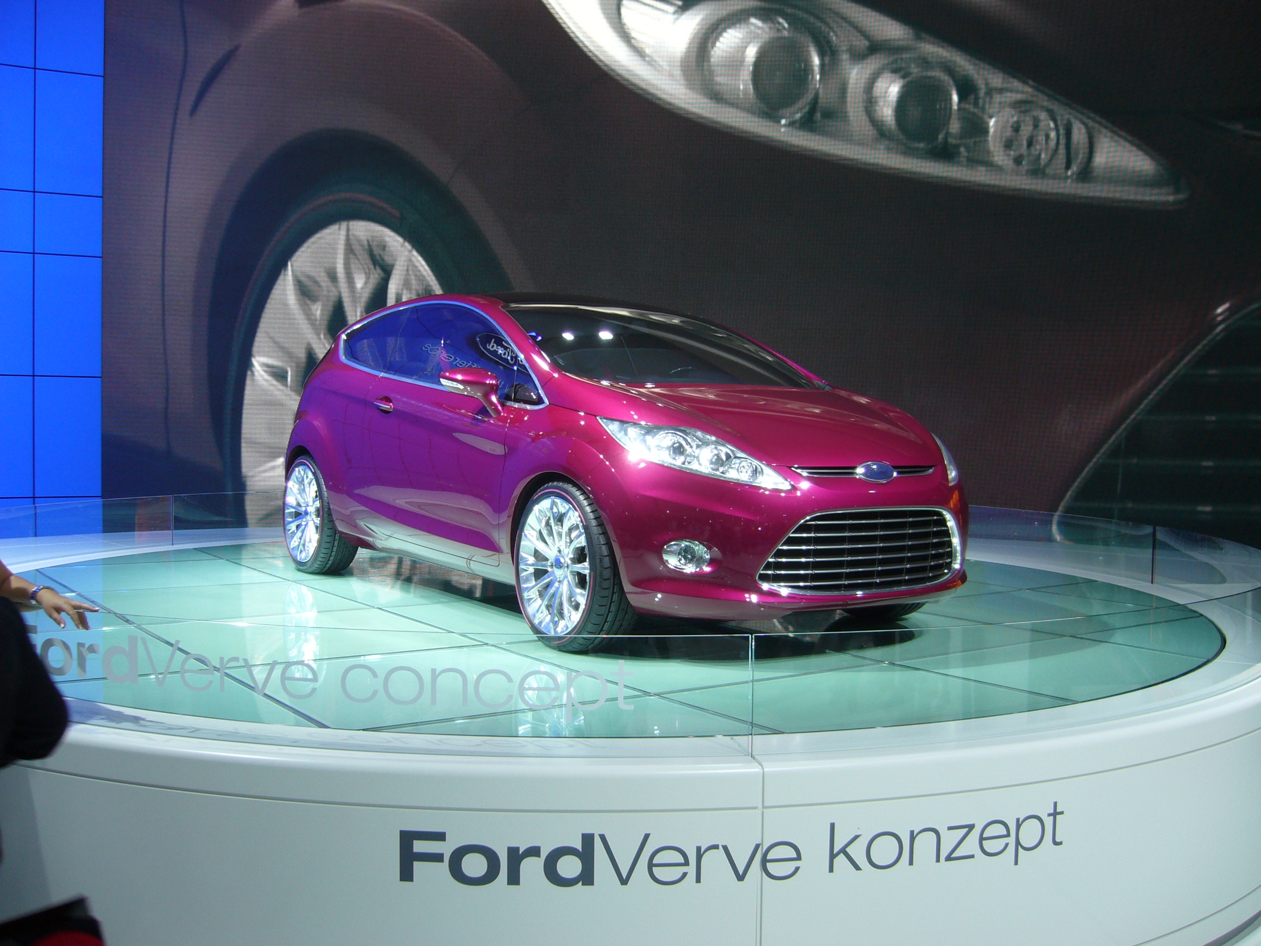 Ford Verve konzept